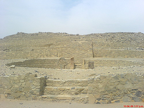 Piramide de la Huaca, Caral.